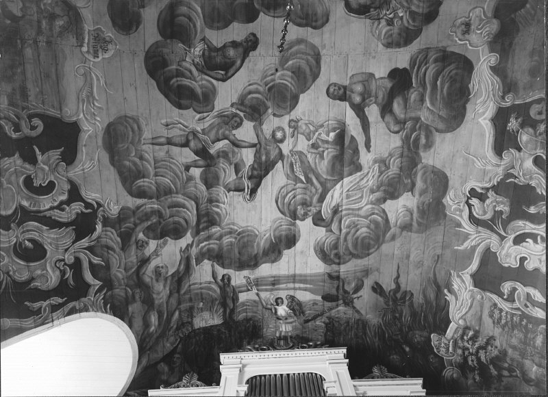 Panelmålning, utförd i oljefärg på trä. Kategori: (03) Målningar på träPanelmålning, utförd i oljefärg på trä.